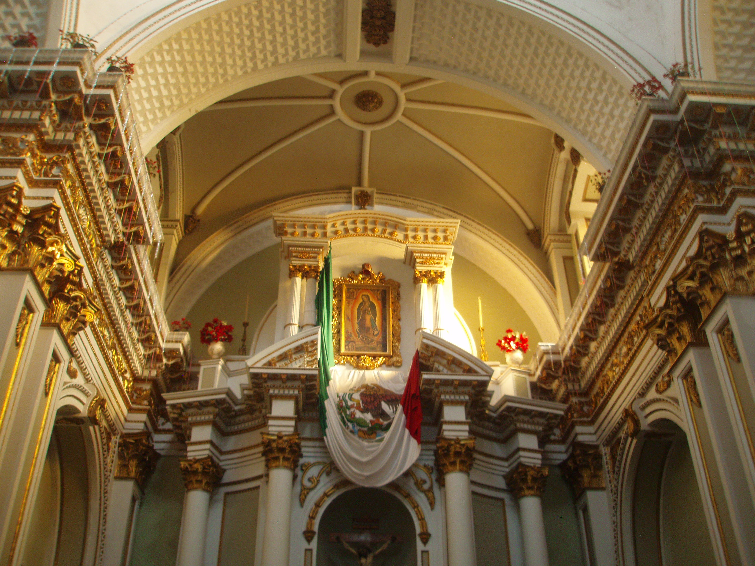 Altar de la catedral de Colima (03ene2012) (04)